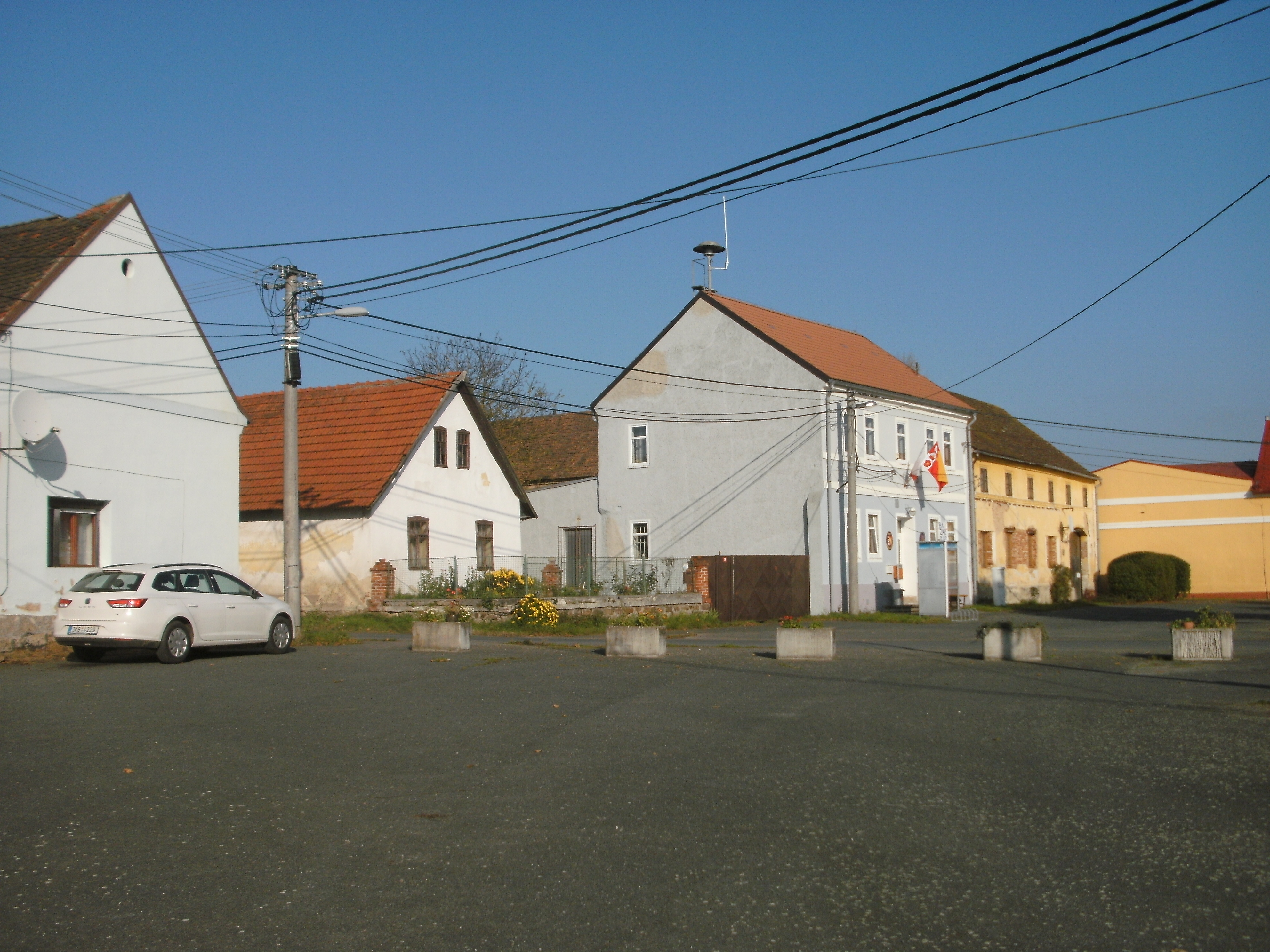 Semněvice